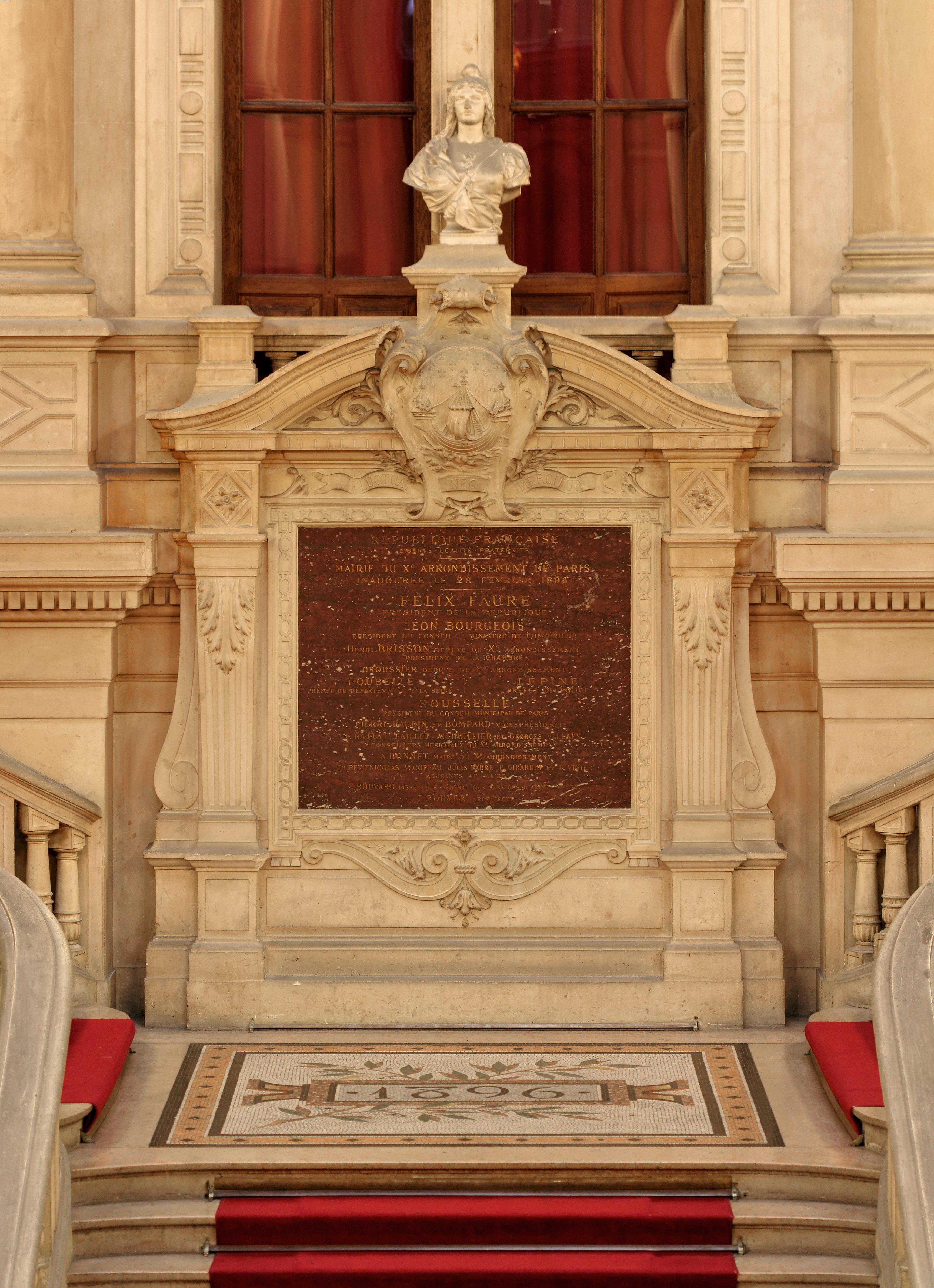 Mairie du 10e arrondissement de Paris, plaque commémorative de l'inauguration de la mairie, sur le palier de repos du grand escalier.